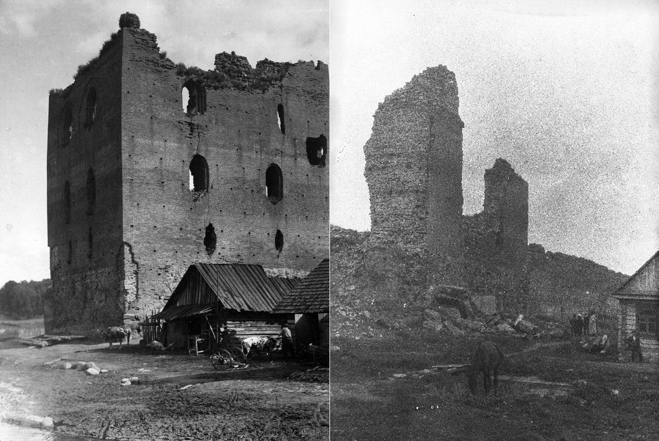 Беларуская (тарашкевіца): Маскалізацыя (русіфікацыя) Вялікага Княства Літоўскага. Мястэчка Крэва Ашмянскага павету. Замак вялікіх князеў, помнік архітэктуры готыкі: выгляд да (налева) і па руйнаваньні расейскай артылерыяй (направа)